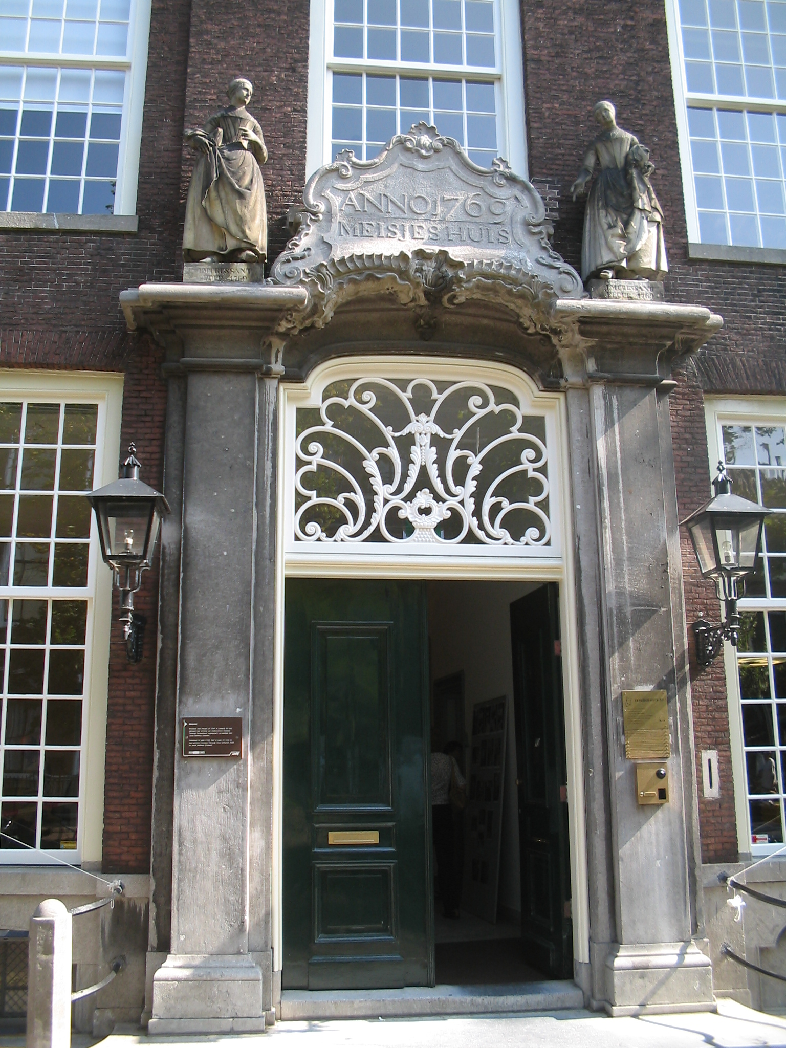 Meisjeshuis, Delft. Sept. 2005